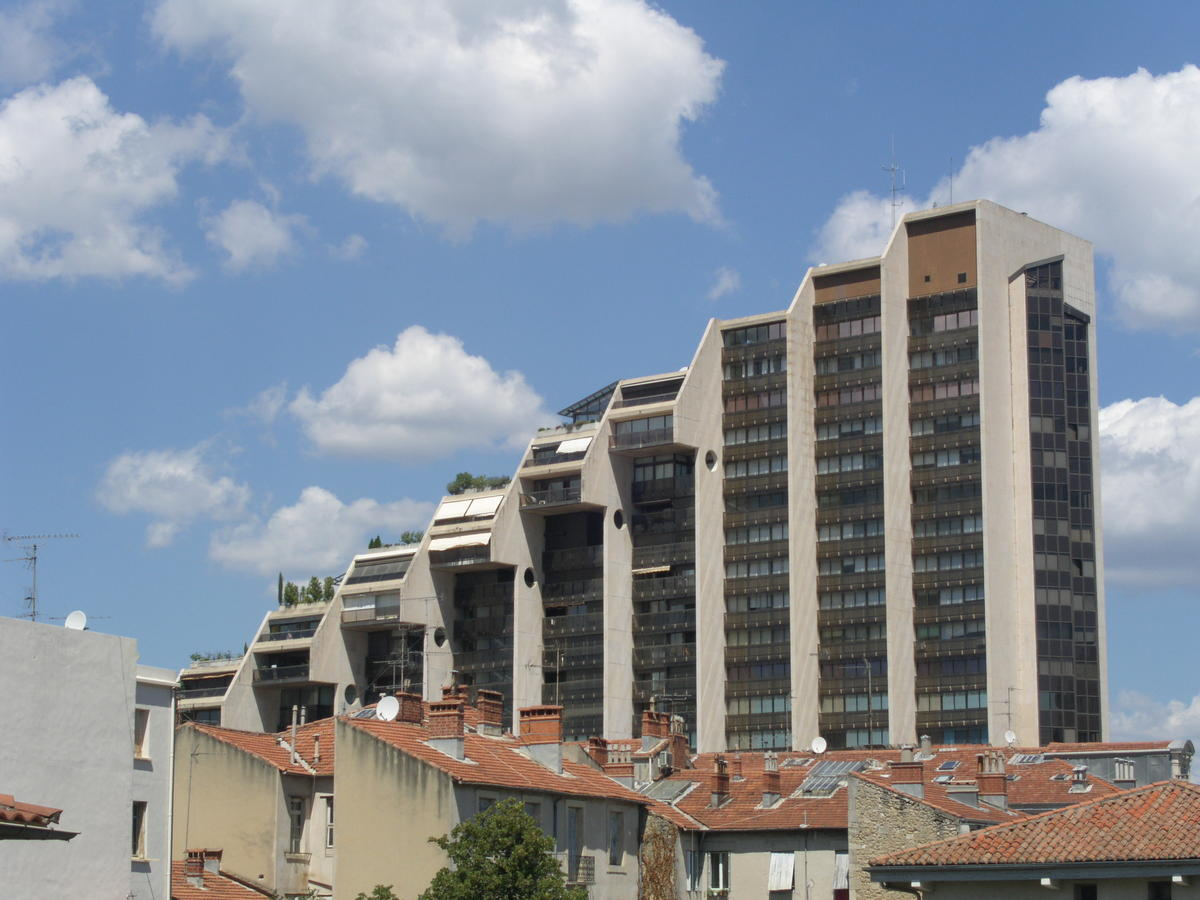 L'immeuble du Triangle à Montpellier (Hérault) Image perso